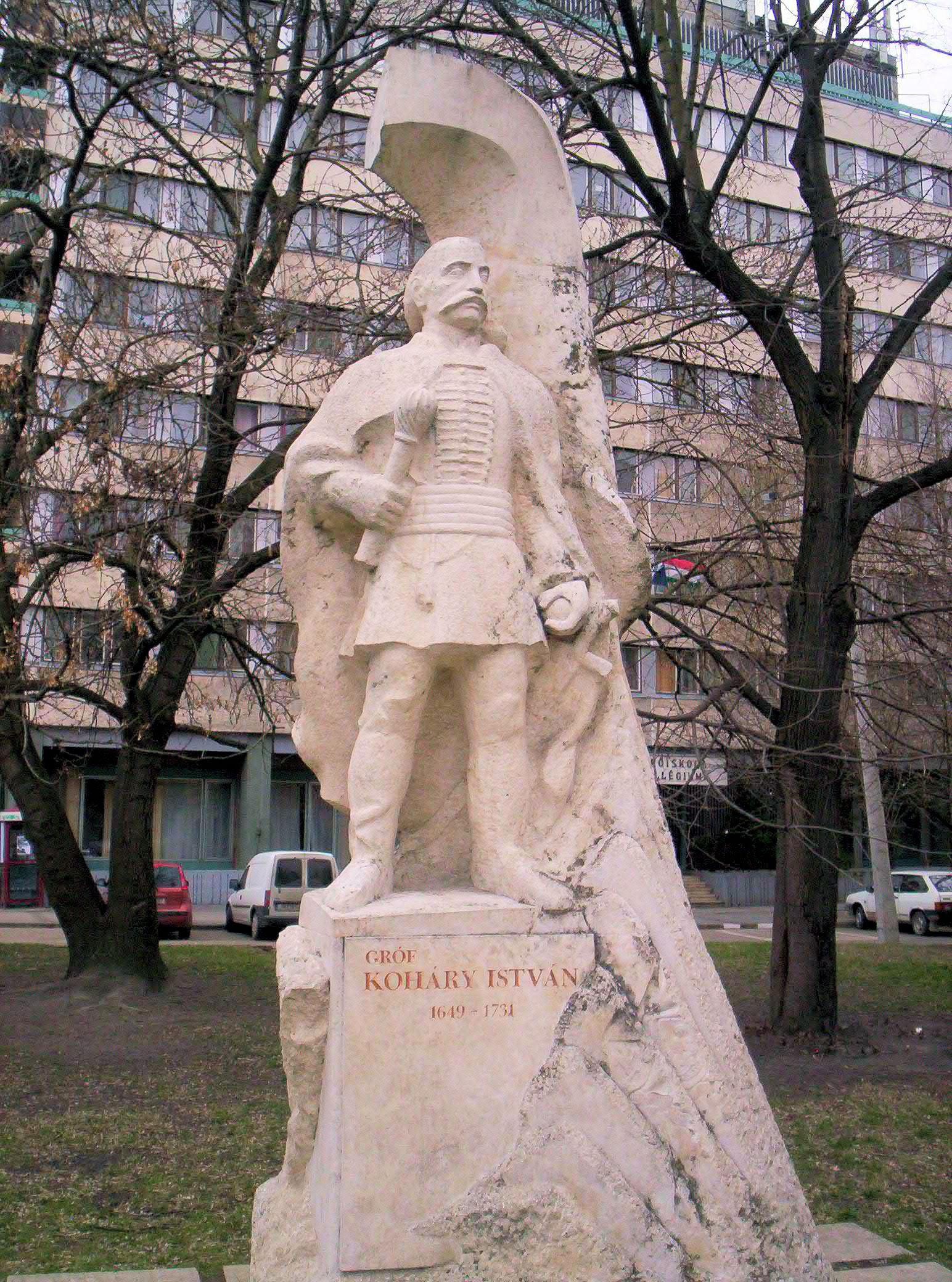 Koháry István szobra Kecskeméten az általa alapított Piarista Iskola előtt. Markolt György alkotása. – photo taken by uploader User:Csanády in 2006.